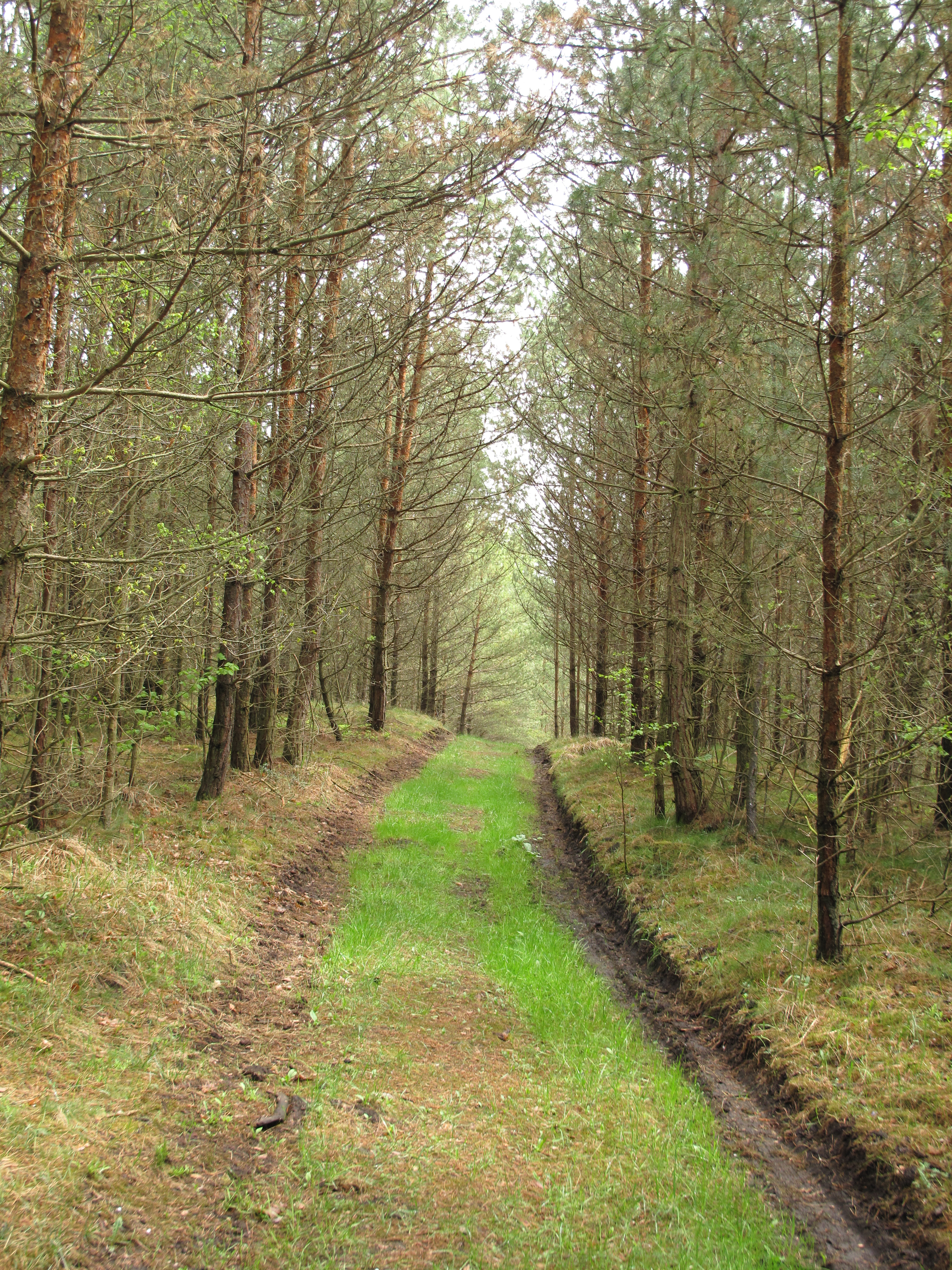 Cesta v přírodní rezervaci Bořinka. Okres České Krumlov, Česká republika.